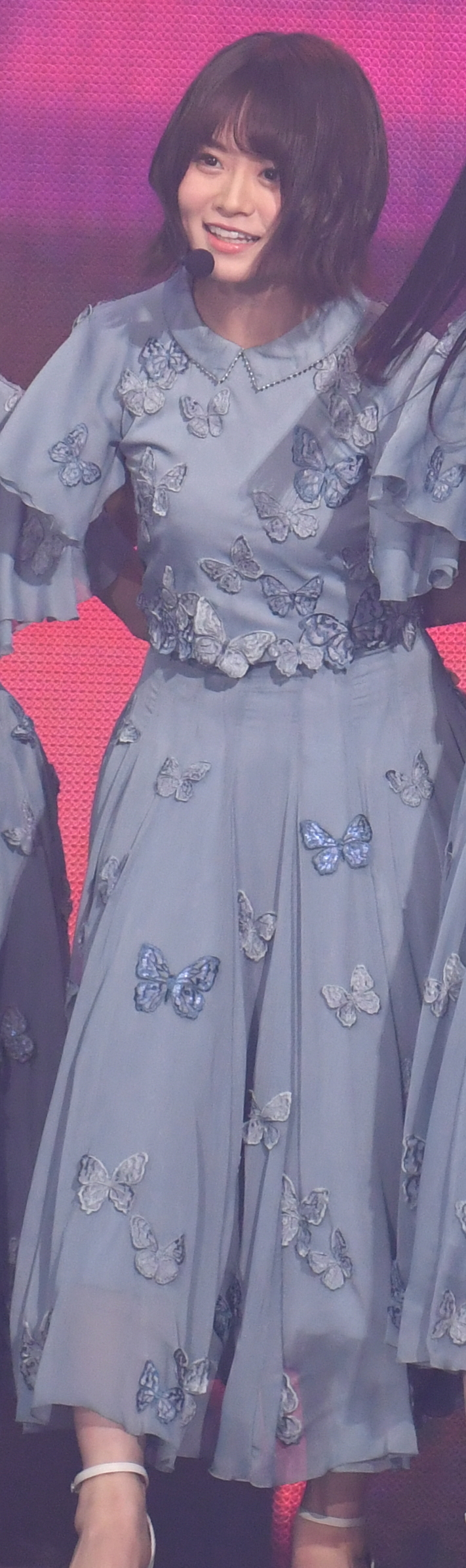 2019.01.26「第14回 KKBOX MUSIC AWARDS in Taiwan」乃木坂46 @台北小巨蛋